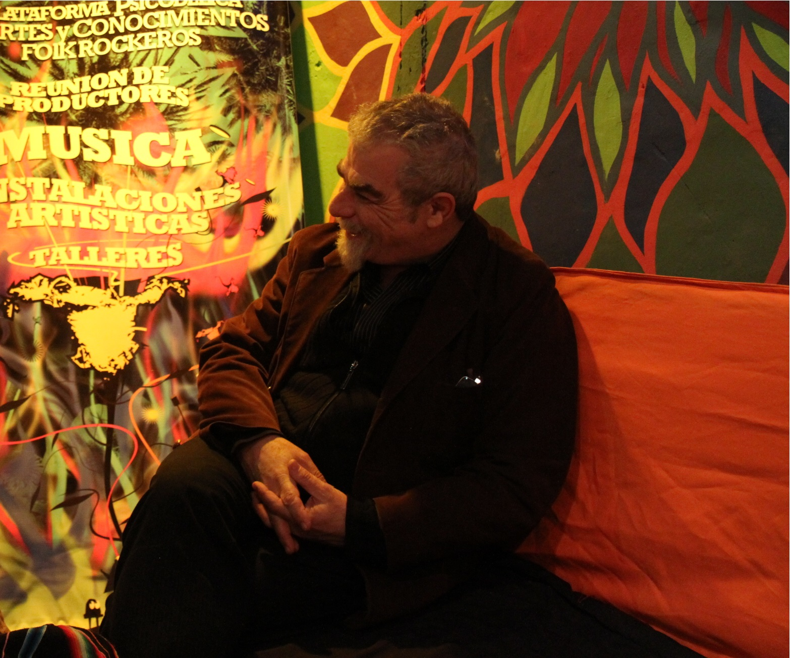 Mario Breuer en 2013.